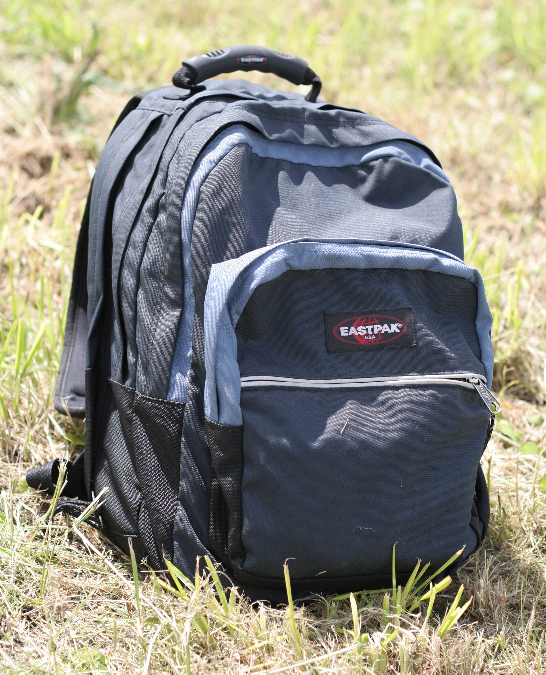 Sac à dos "Ultimate" de chez Eastpak.